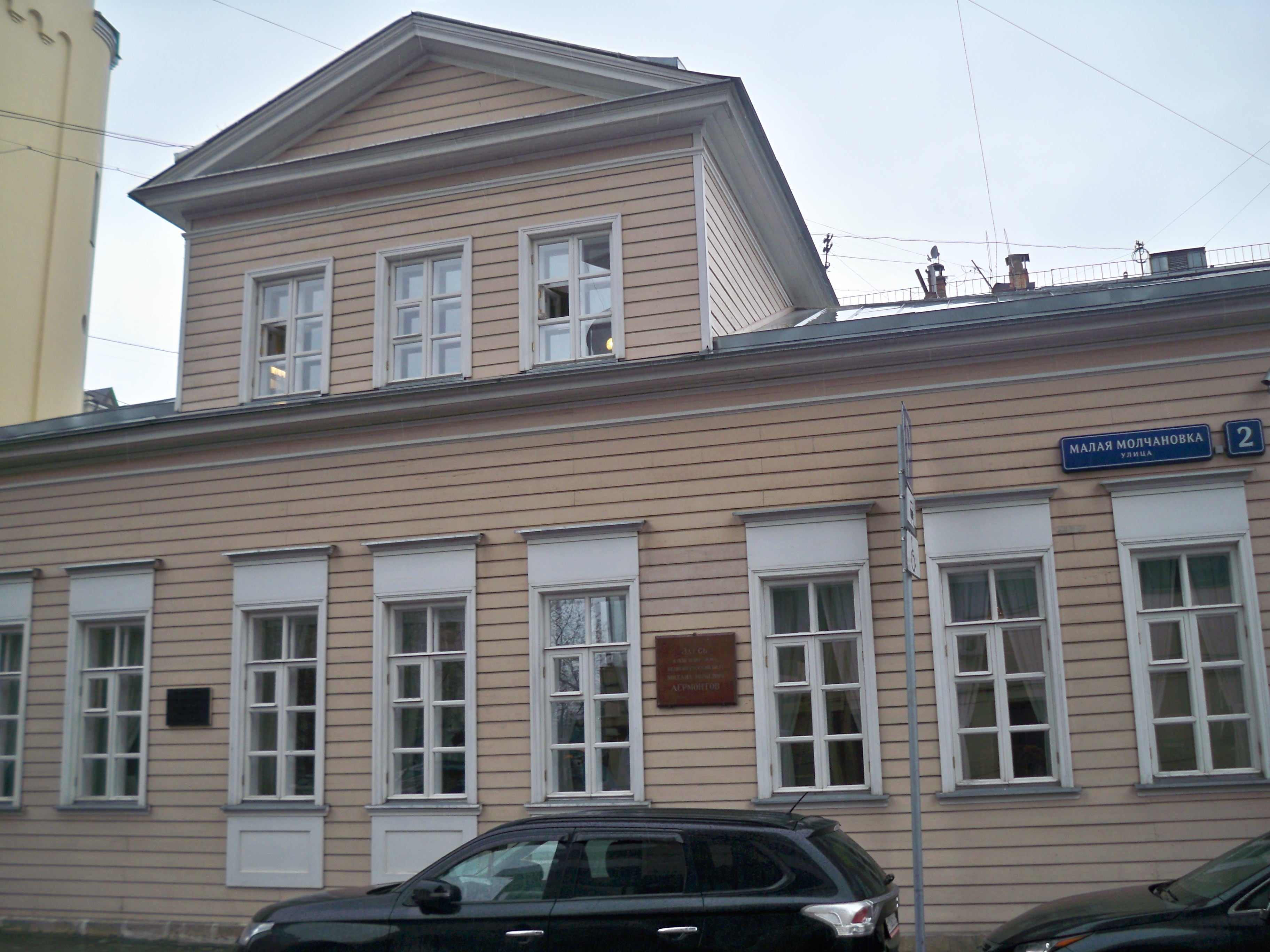 Rumah-Muzium M. Yu Lermontov di Moscow